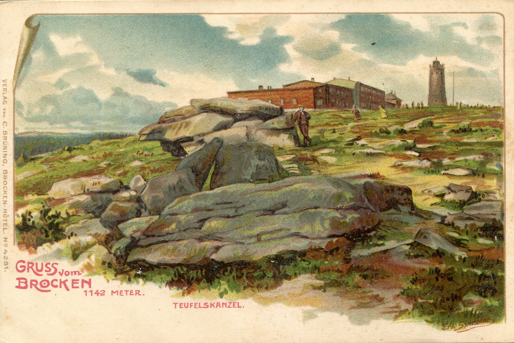 Titel: Gruss vom BROCKEN, TEUFELSKANZEL, 1142 METER; Kartennummer: 4281; Signatur: Erw.Spindler; Signaturlage: rechts unten; Gedruckt bei: C. Brünning, Brocken-Hotel